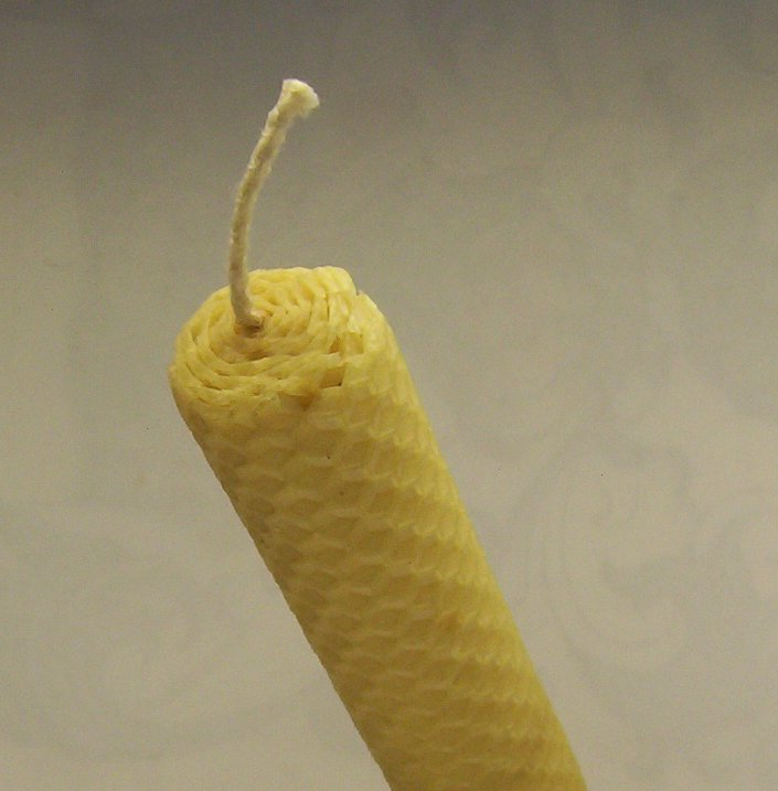 Gerolde bijenwaskaars, eigen foto, gebruik onder GFDL